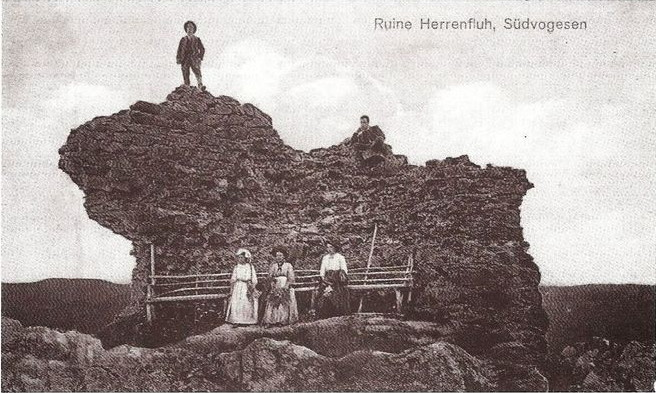 Le Château du Herrenfluh, carte postale